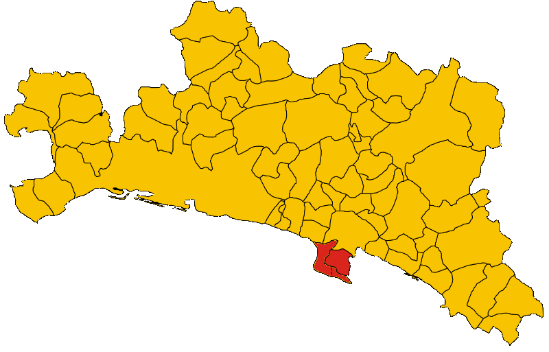 Mappa del Parco naturale regionale di Portofino (Provincia di Genova, Liguria, Italia) con i comuni del parco